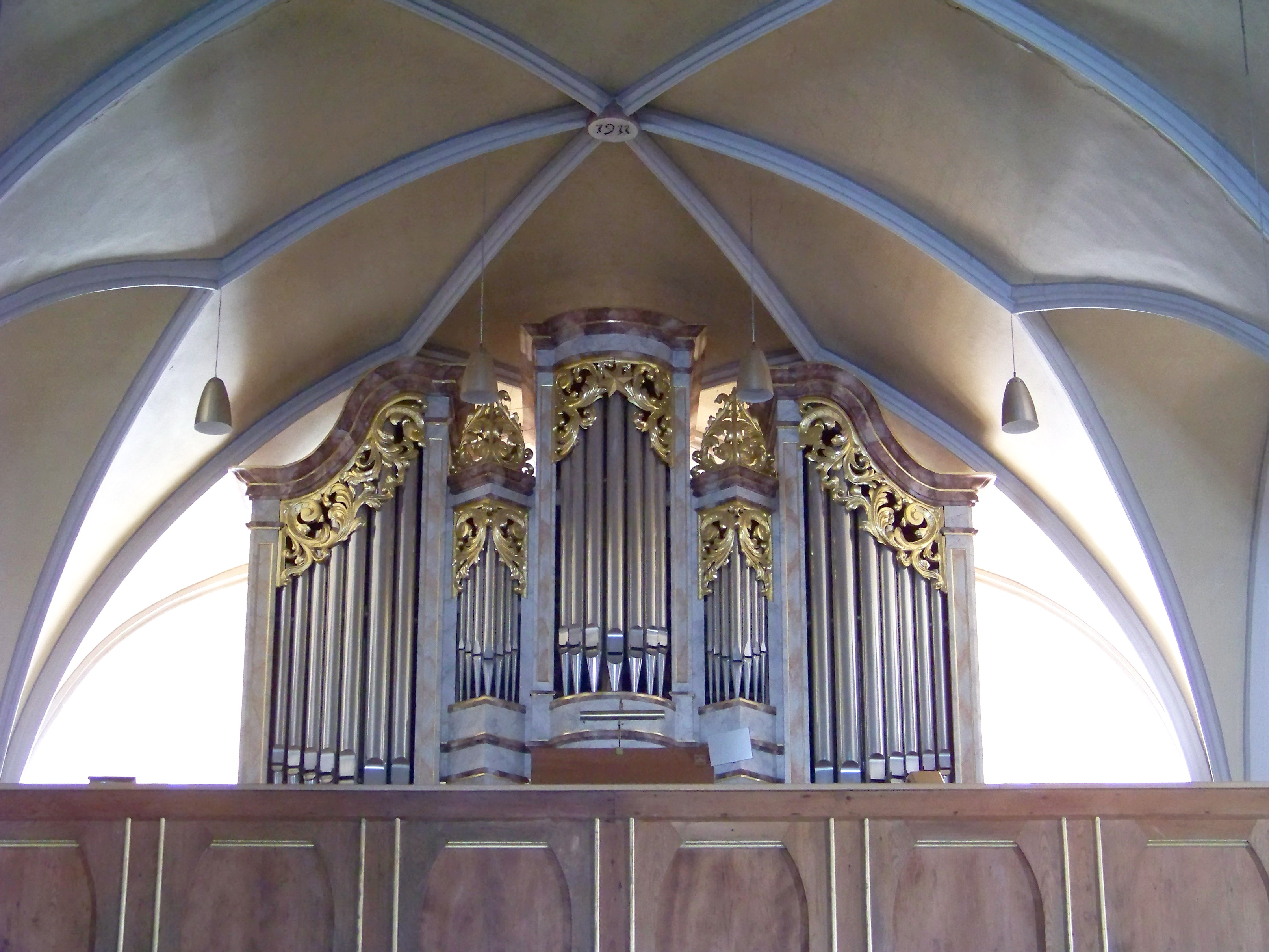 Essenbach, Rathausplatz 13. Katholische Kirche Mariä Himmelfahrt. Saalbau mit später angefügten Seitenschiffen, heute Staffelhalle, spätgotischer Bau um 1470, durch Seitenschiffe um 1670 und nochmals 1713 erweitert. Im Jahr 1994 erhielt die Pfarrkirche eine neue Orgel von der Firma Sandtner aus Dillingen an der Donau. Das Instrument besitzt insgesamt 26 Register auf zwei Manualen und Pedal. Die Spiel- und Registertraktur ist mechanisch. Die Disposition orientiert sich an barocken Vorbildern und nimmt so Bezug zur Ausstattung der Kirche.